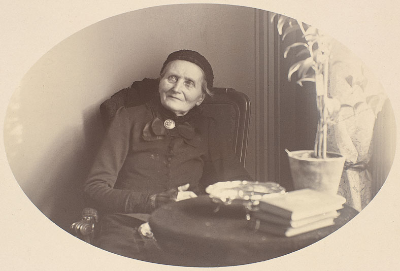 Tittel / Title: Portrett av Camilla Collett, 1893 Motiv / Motif: Bildet er tatt av Camillas sønn, Robert Collett. Dato / Date: April 1893 Fotograf / Photographer: Robert Collett (1842-1913) Eier / Owner Institution: Nasjonalbiblioteket / National Library of Norway Lenke / Link: Bildesignatur / Image Number: bldsa_rcalb002_11b